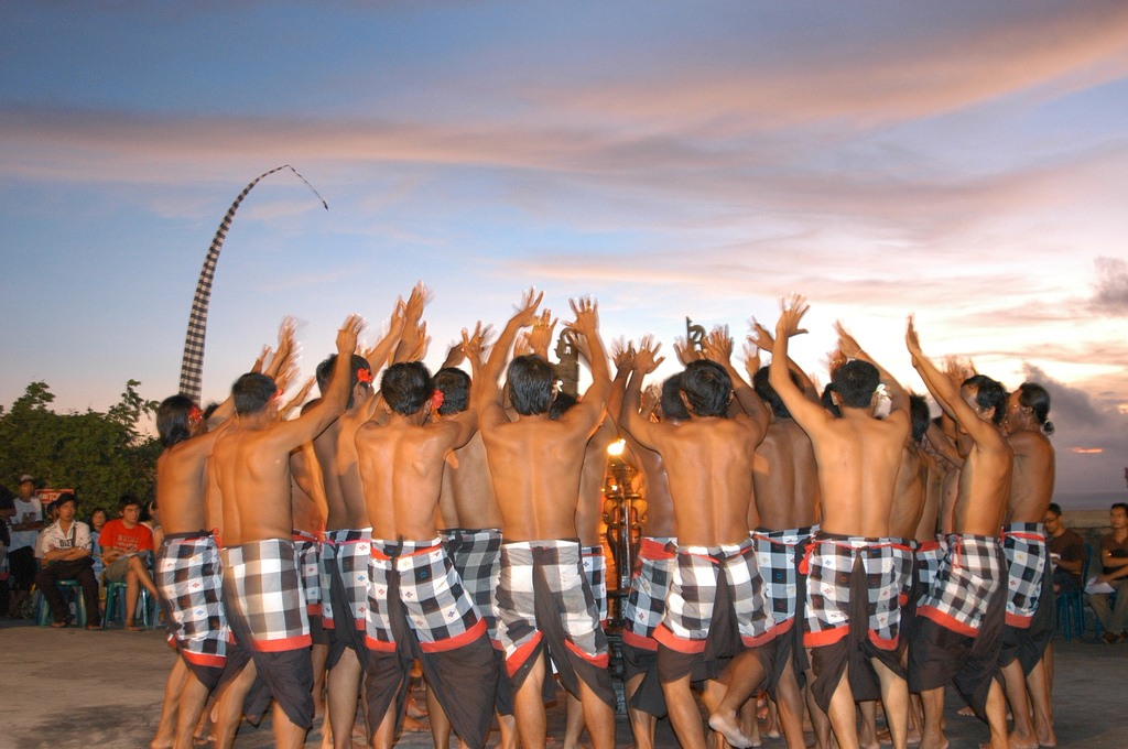 Dance of Kecak. Bali